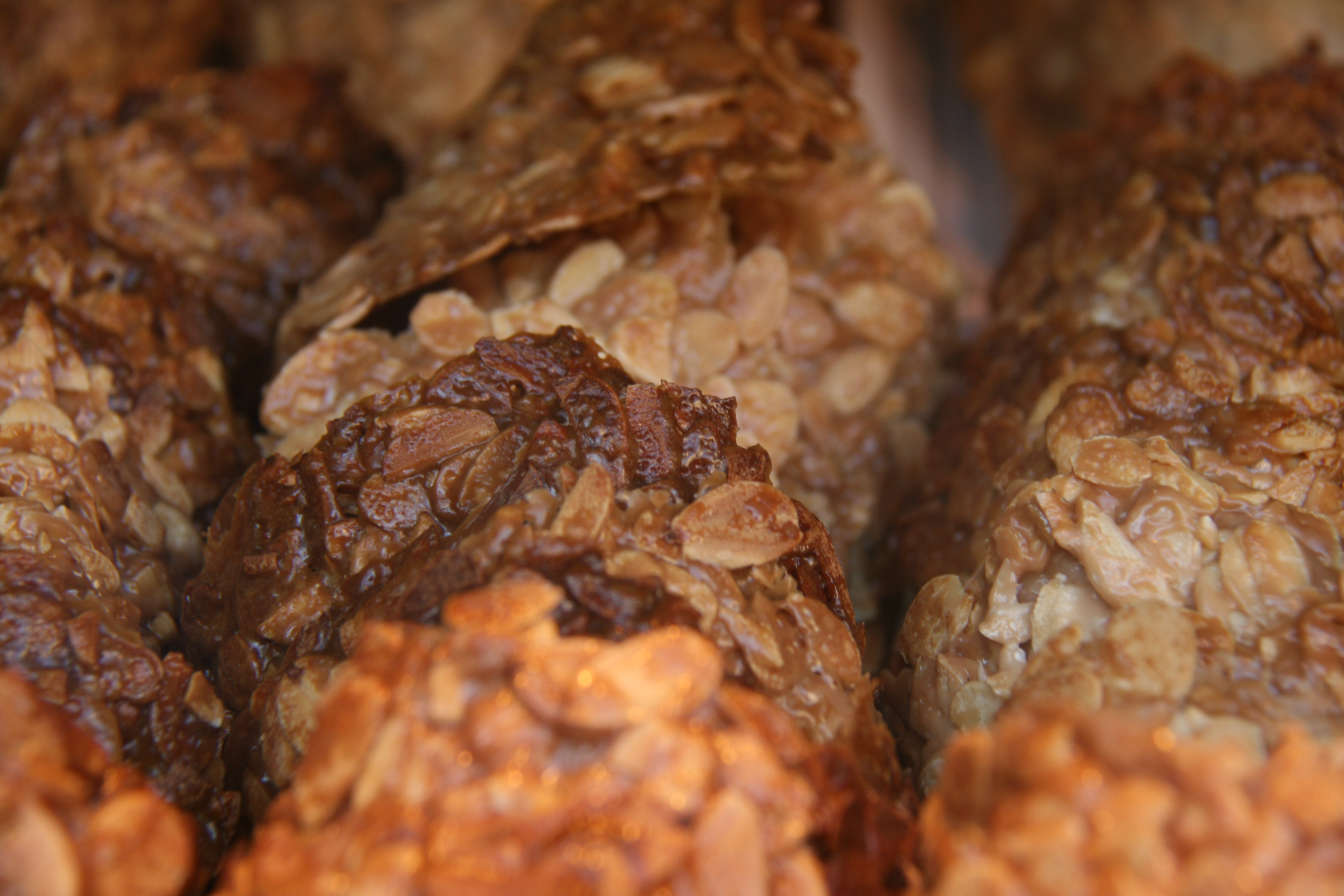 Tejas en Valladolid